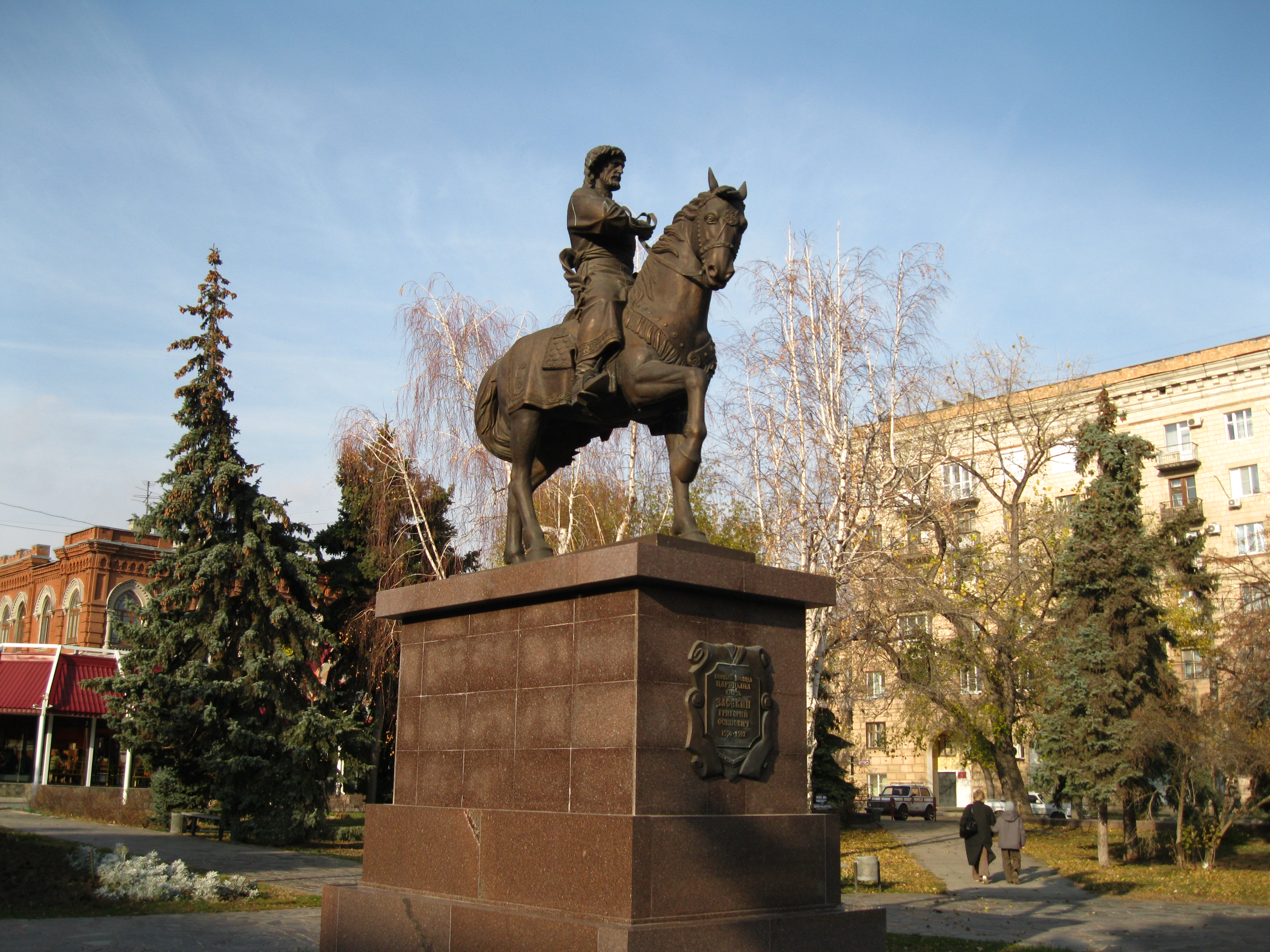 Памятник первому воеводе Царицына князю Засекину Григорию Осиповичу